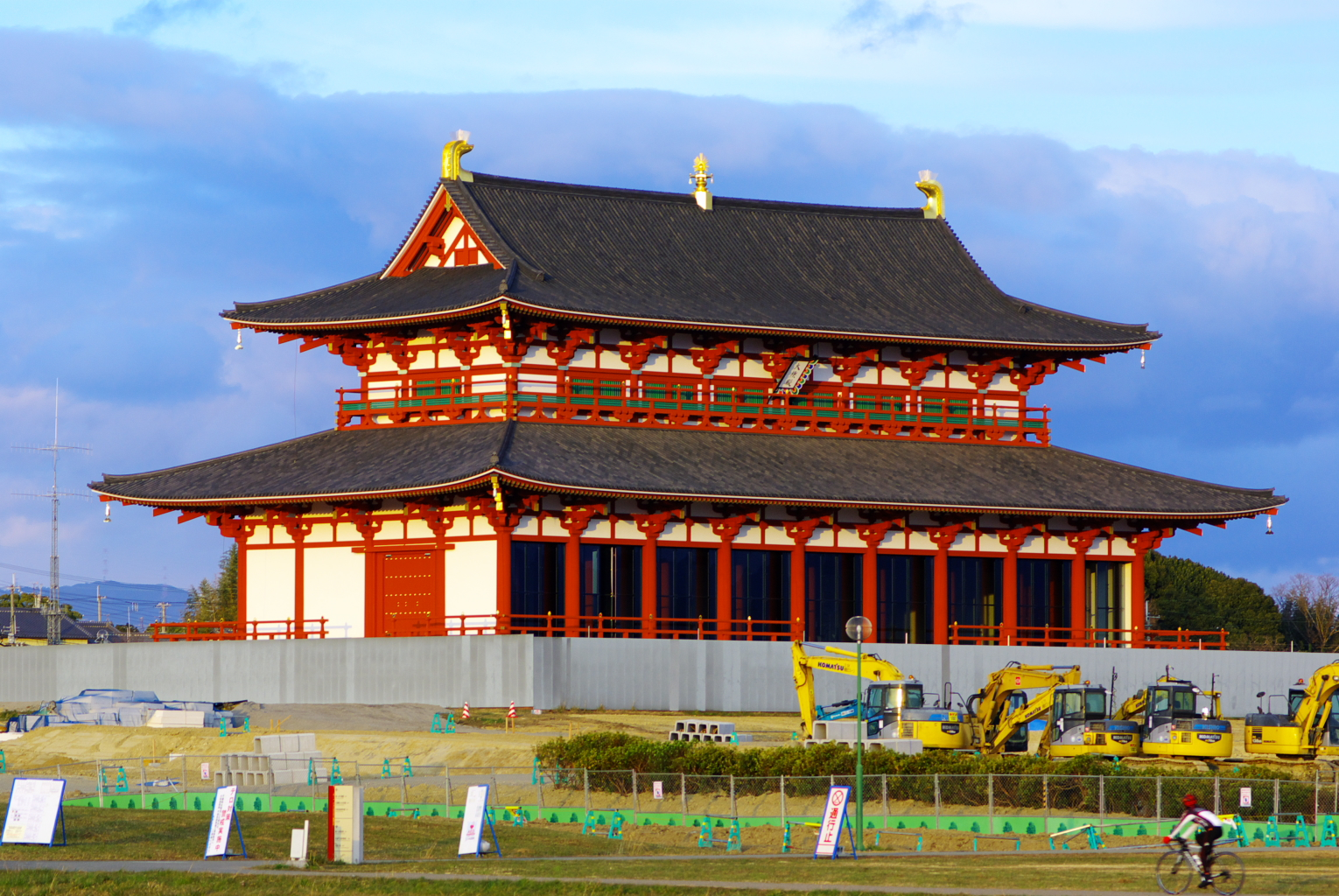 復元工事中の平城宮大極殿